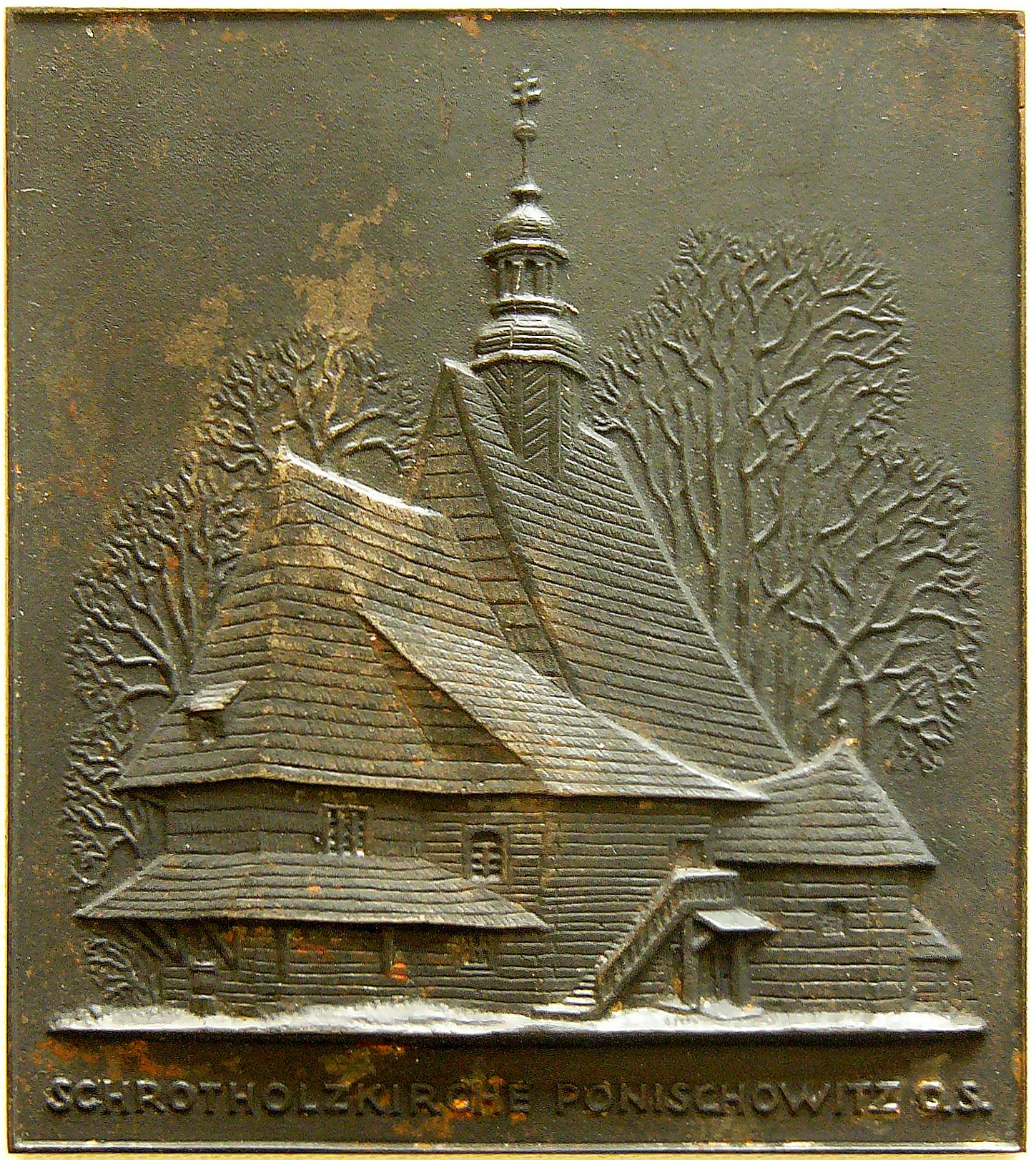 HAG-Plakette mit der St. Johannes Baptist Schrotholzkirche in Ponischowitz in Kreis Gleiwitz / Oberschlesien. Gestalltung: Peter Lipp